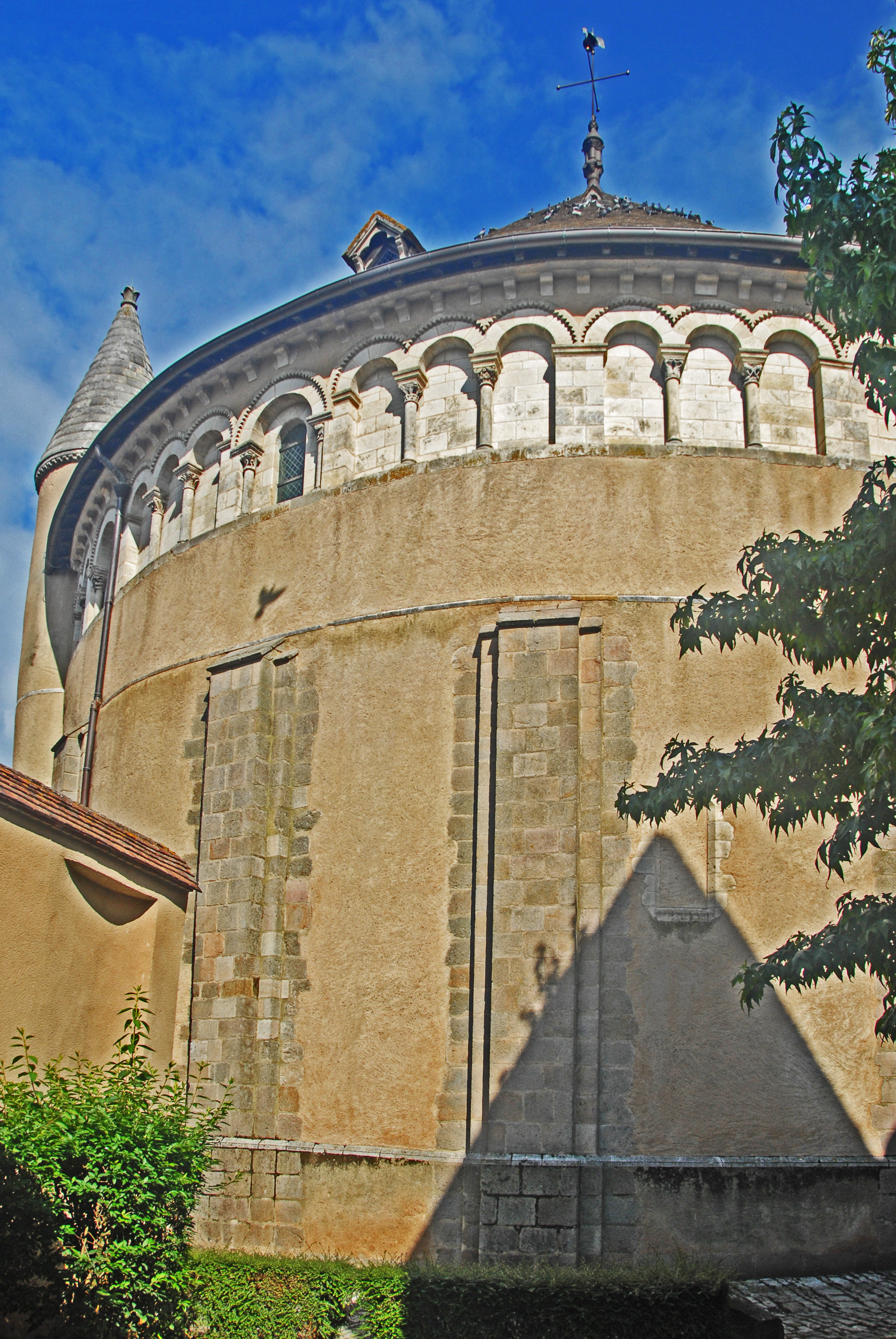 Neuvy_St.-Sépulcre, Rotunde von W